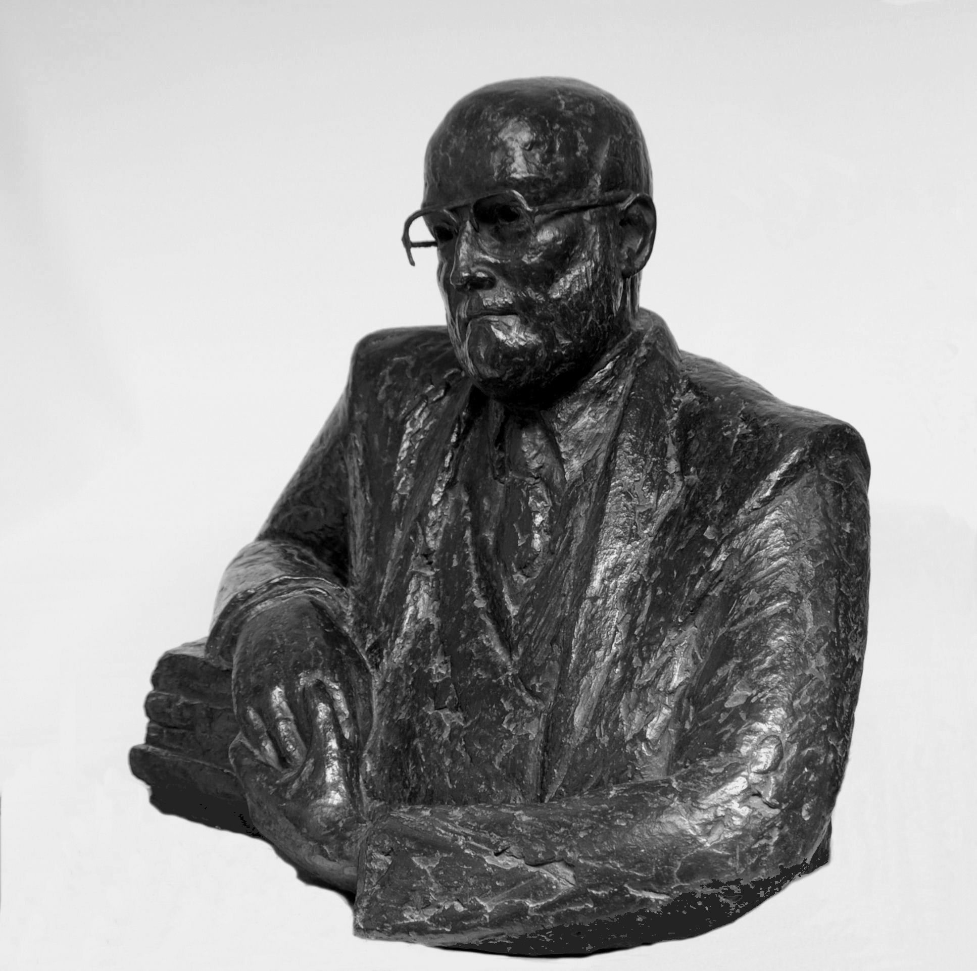 Gebeeldhouwd portret van Gerhard Durlacher in brons.